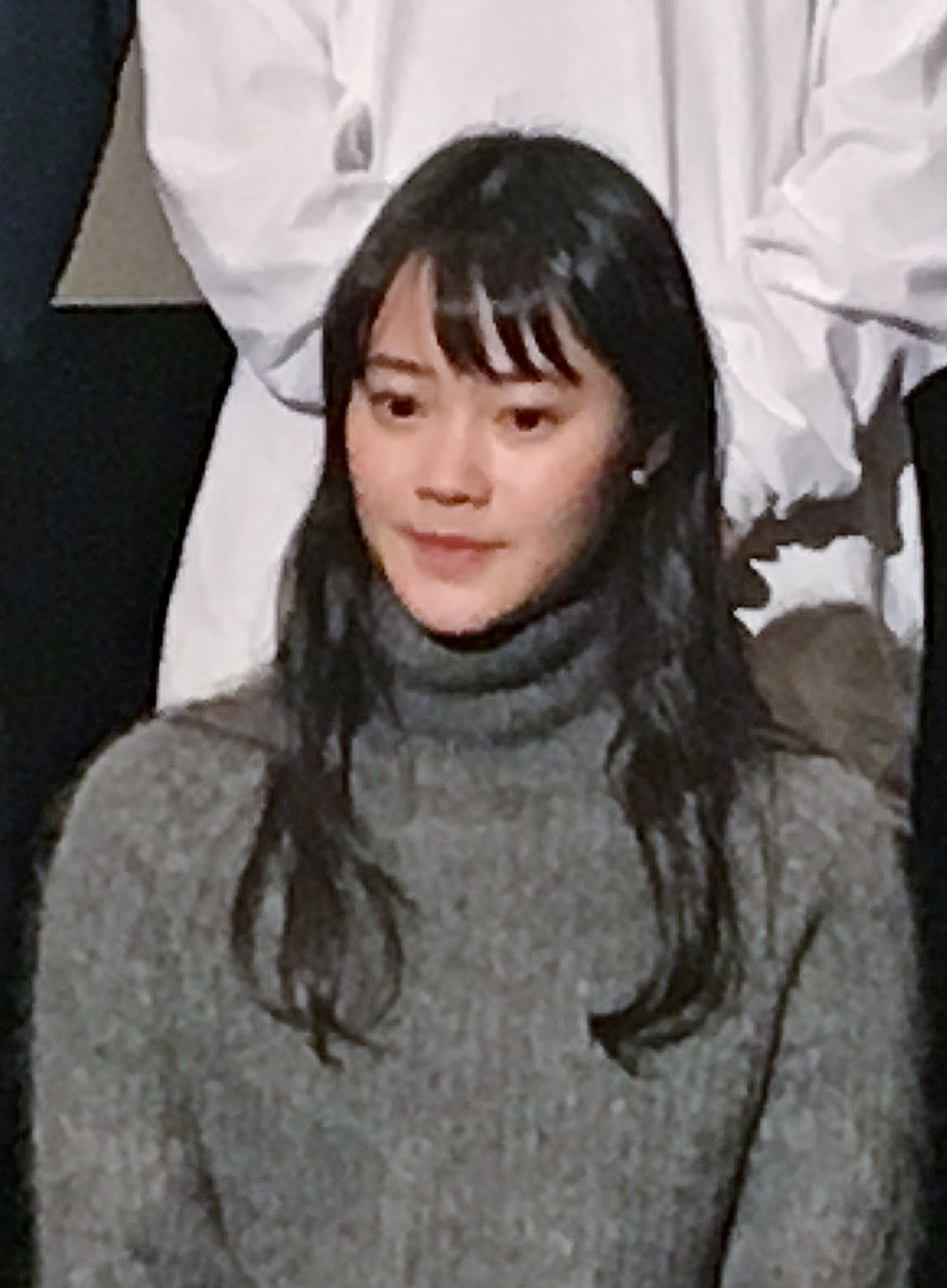 小川あん（2018年11月15日、新宿K's cinema） 「あいが、そいで、こい」舞台挨拶にて